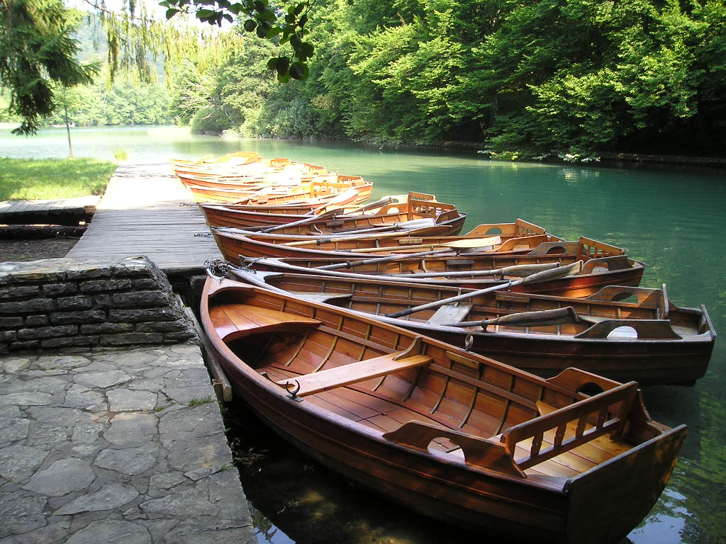 čamci na plitvičkim jezerima